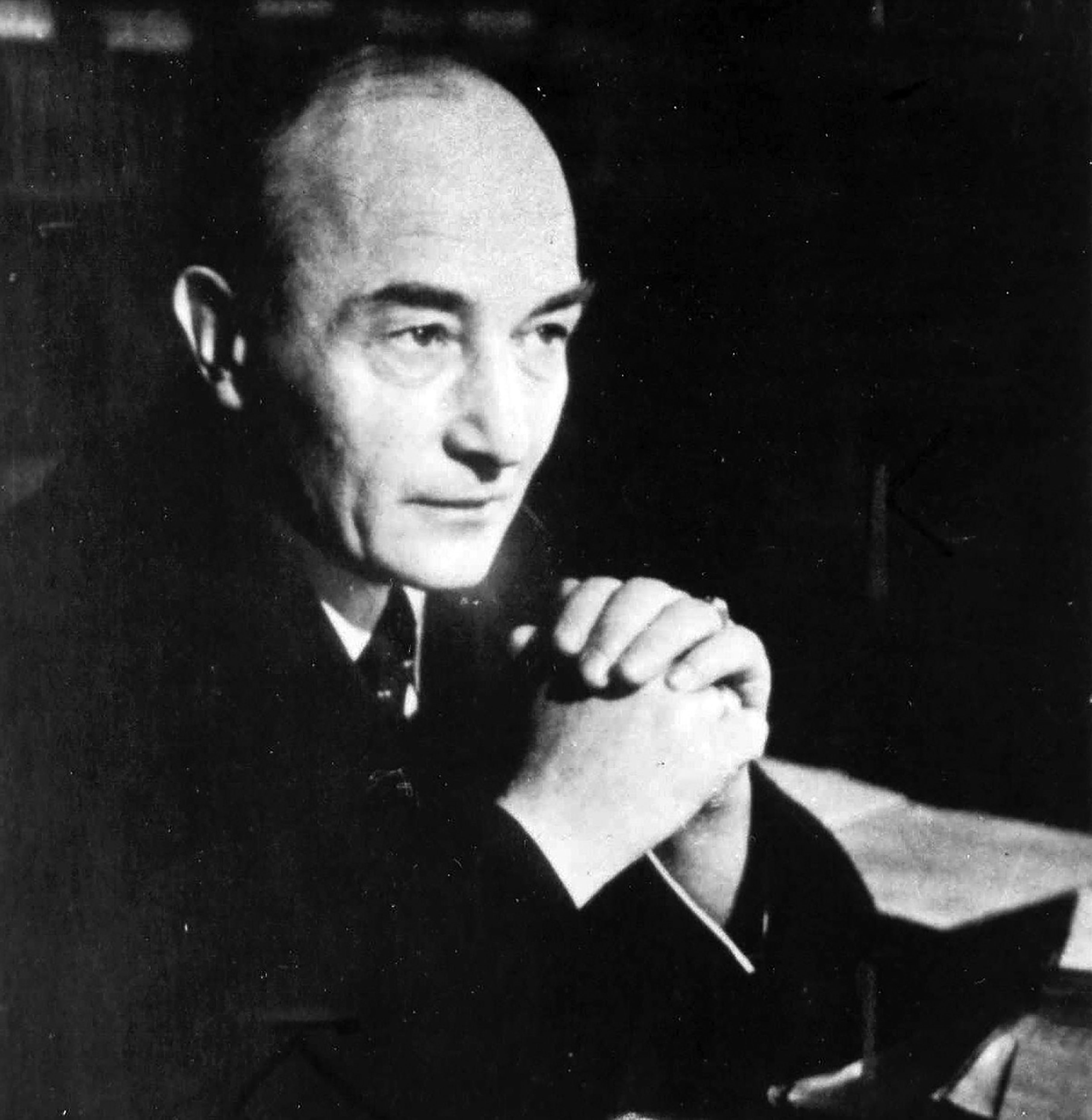 Роберт Музиль, фотография 1930 года